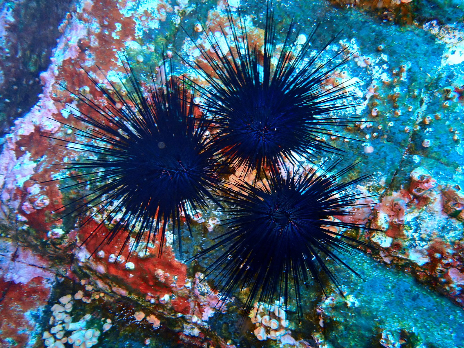 Diadema mexicanum observés dans le Golfe de Californie.